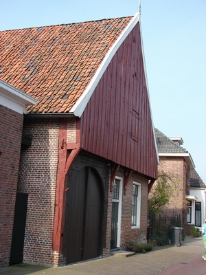 Nedersaksies: Schoppe van et stadsmuseum in Grolle